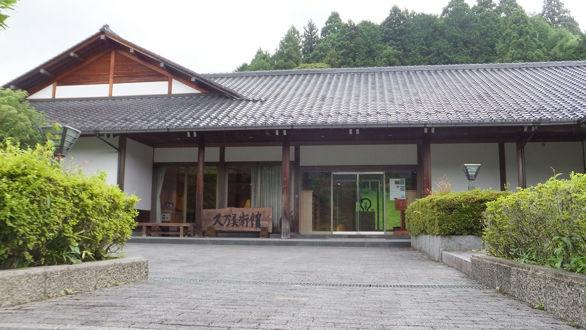 愛媛県上浮穴郡久万高原町 久万美術館